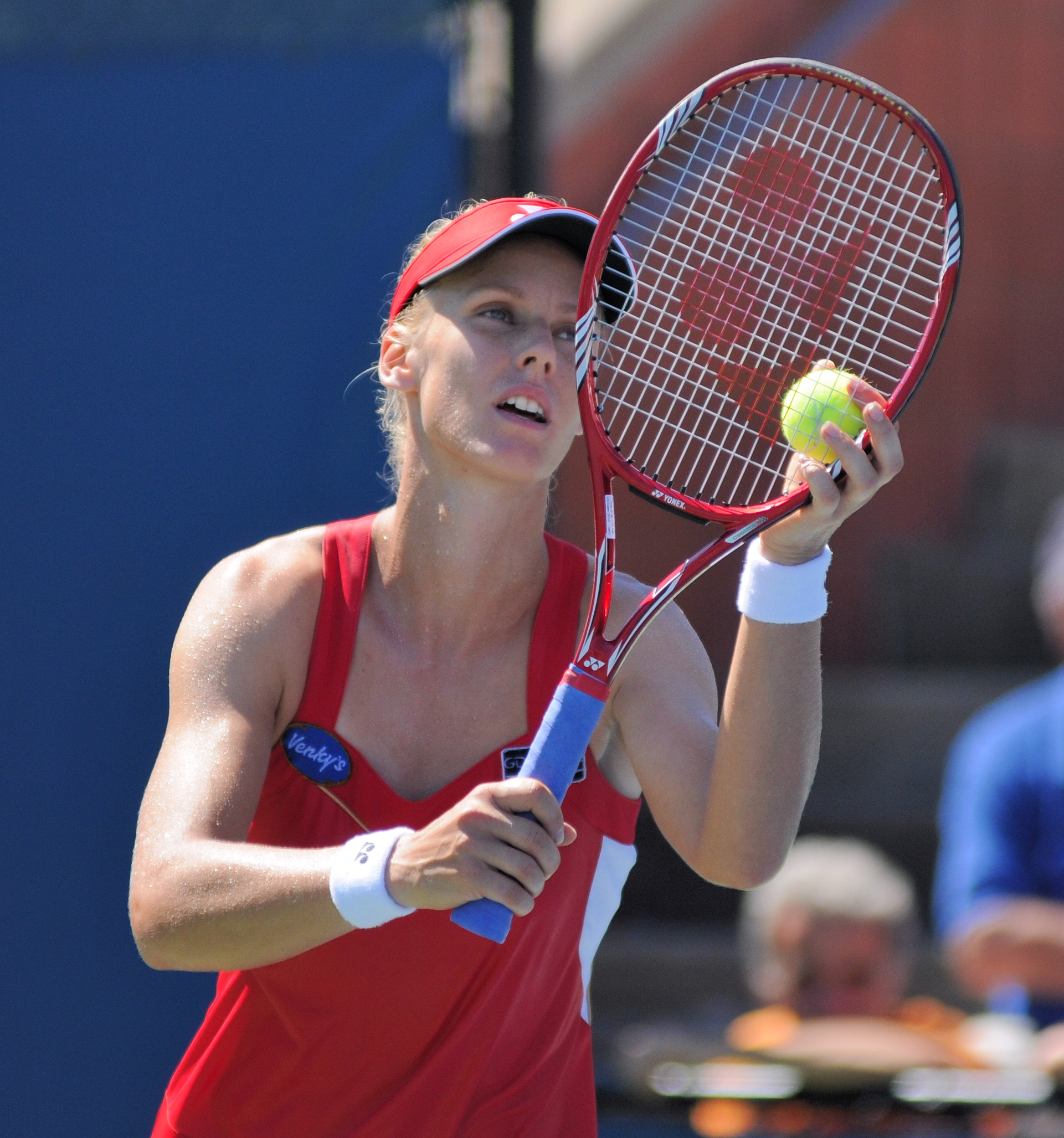 Elena Dementieva - US Open 2010